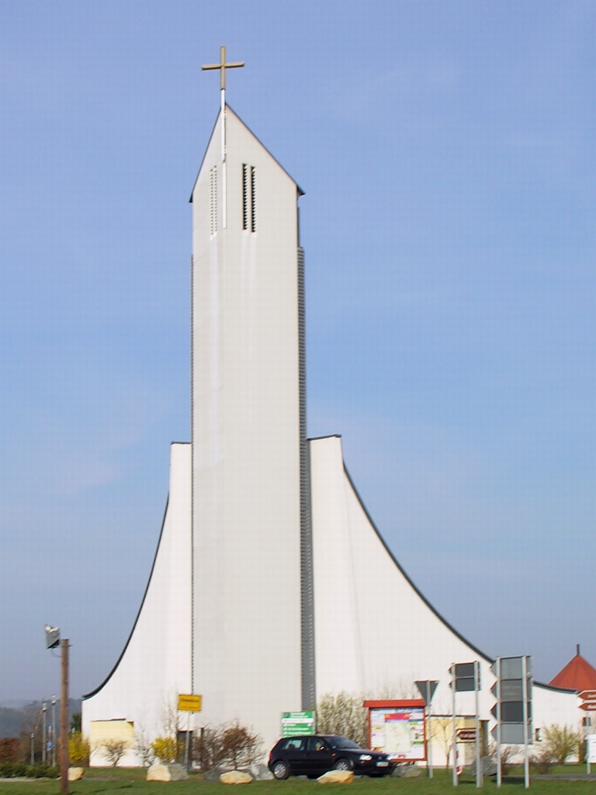 Ostansicht der katholischen Kirche St. Christophorus von 1998 in Himmelkron, Bayern - Foto 2012 Wolfgang Pehlemann Steinberg/Ostsee DSCN6994